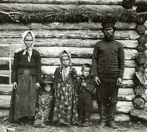 Родина_саамів.jpg: Родина саамів, Росія, 20-і роки ХХ ст.